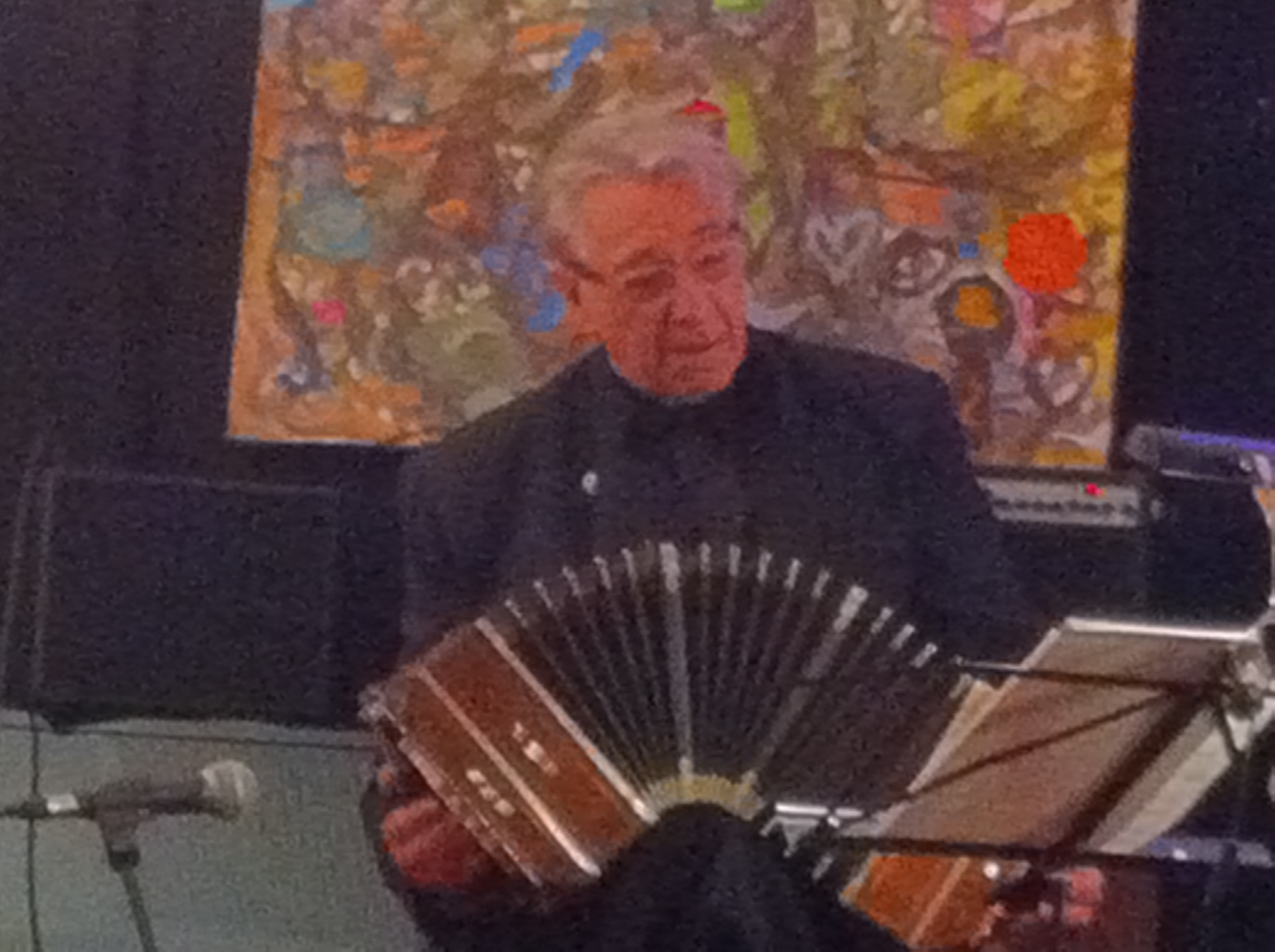 Raul Jaurena